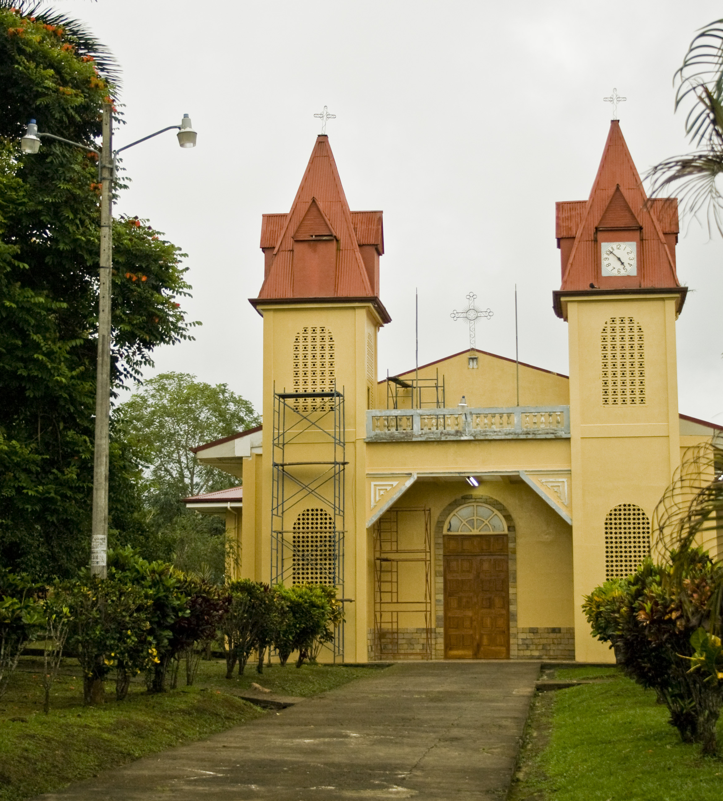 Iglesia de Miramar. Cantón de Montes de Oro. Provincia de Puntarenas. Costa Rica.